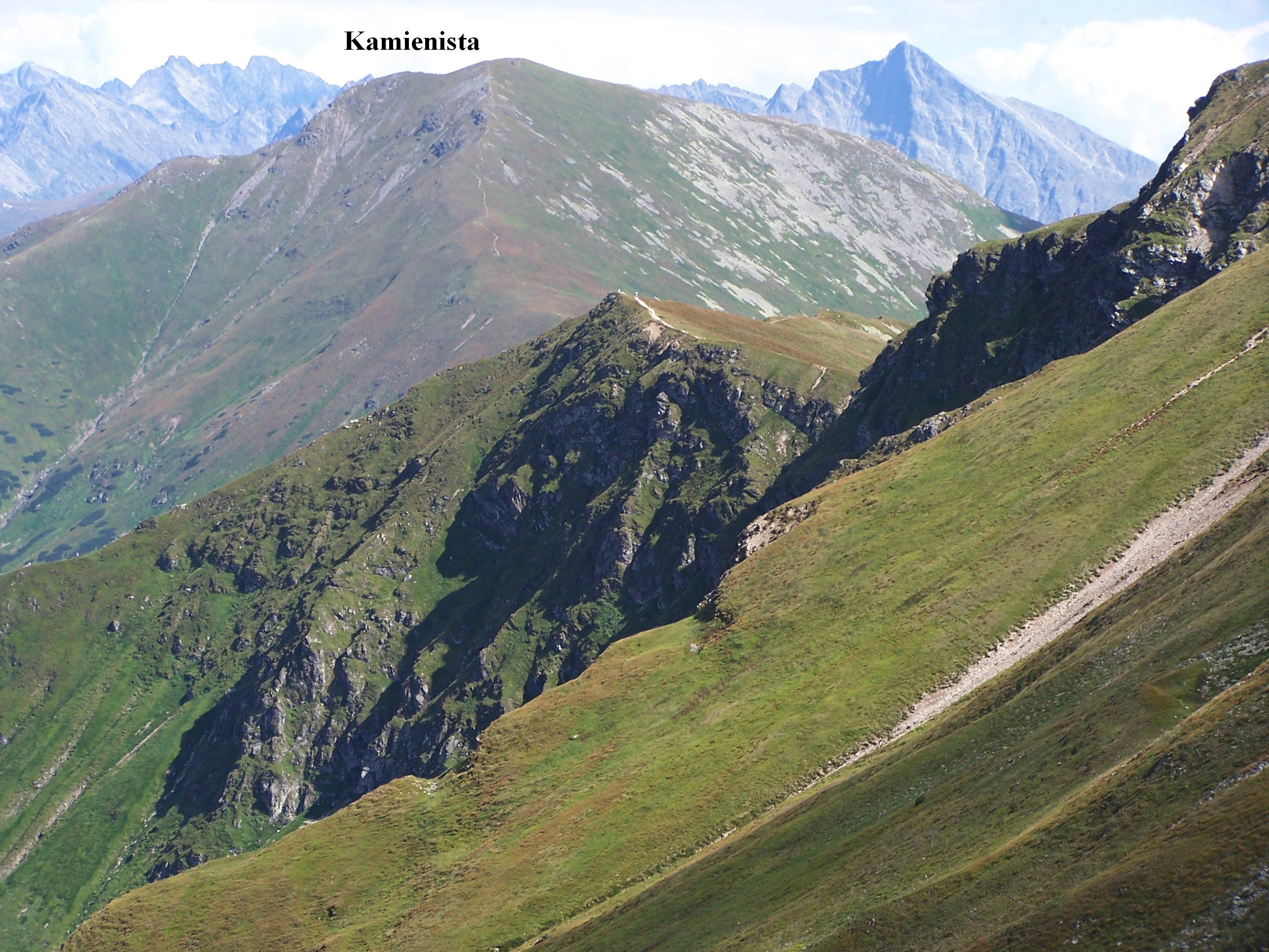 Kamienista(Tatra Mountains)